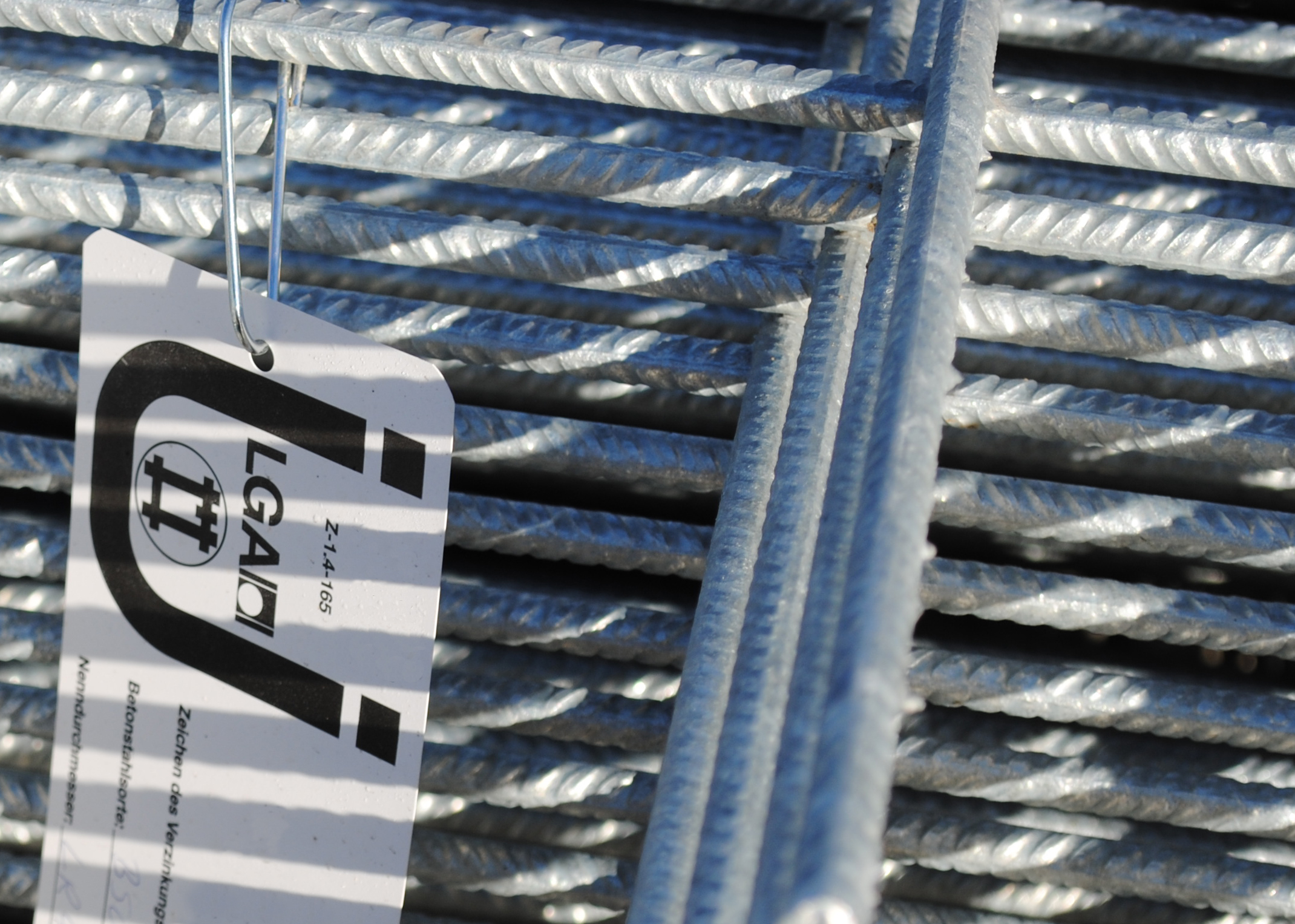 Feuerverzinkter Betonstahl gemäß allgemeiner bauaufsichtlicher Zulassung.